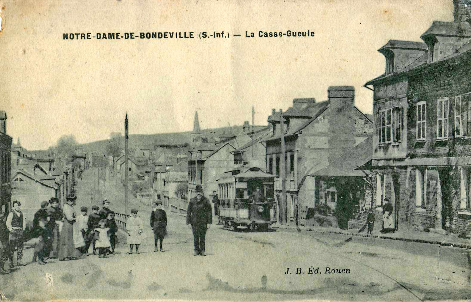 Carte postale ancienne éditée par JB à Rouen : NOTRE-DAME-DE-BONDEVILLE - Le Casse-Gueule